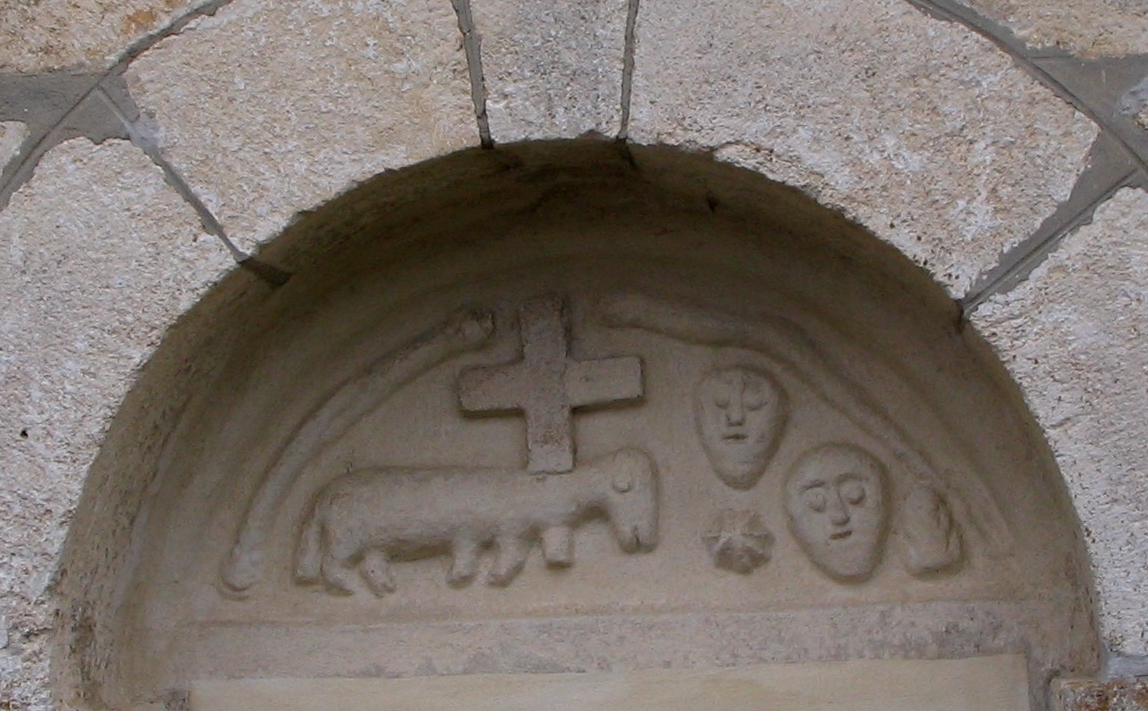 Tympanon der Kirche St. Andreas Geibenstetten Ortsteil von Neustadt an der Donau